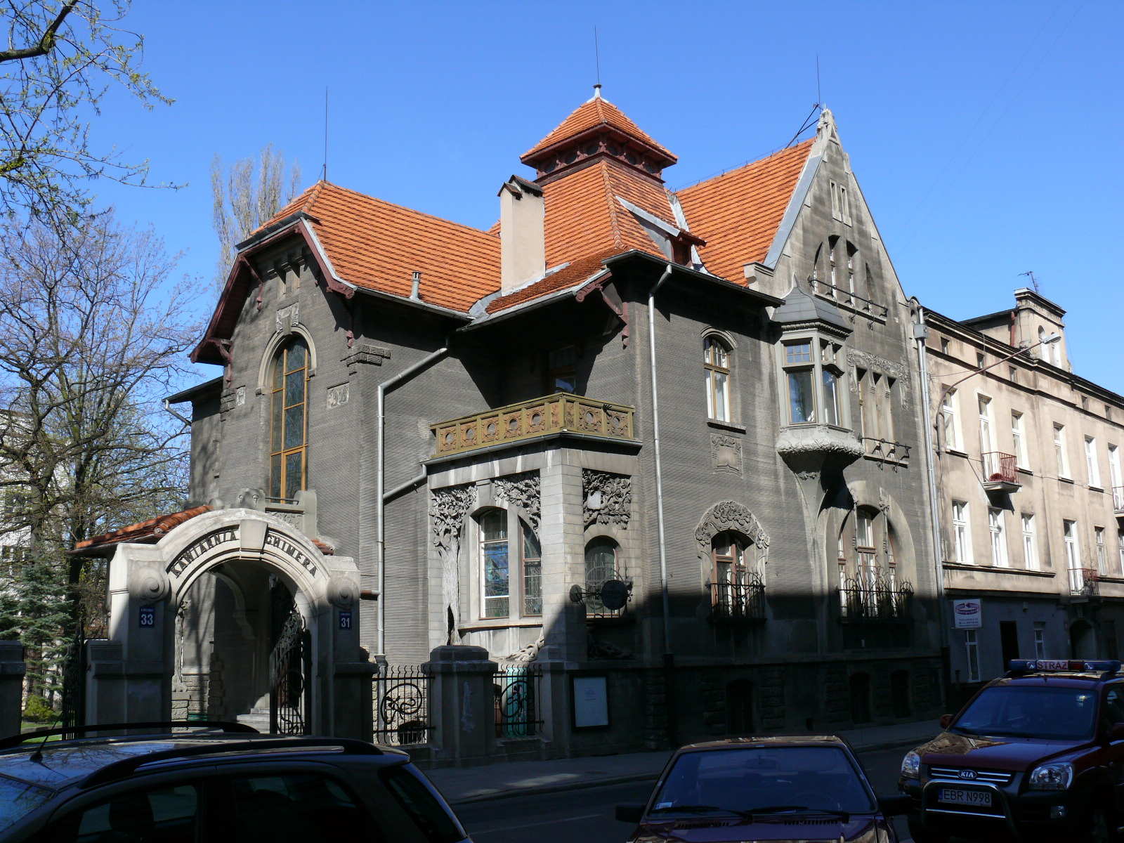 Willa Leopolda Rudolfa Kindermanna przy ul. Wólczańskiej 31/33 tzw. "Willa pod jabłoniami"